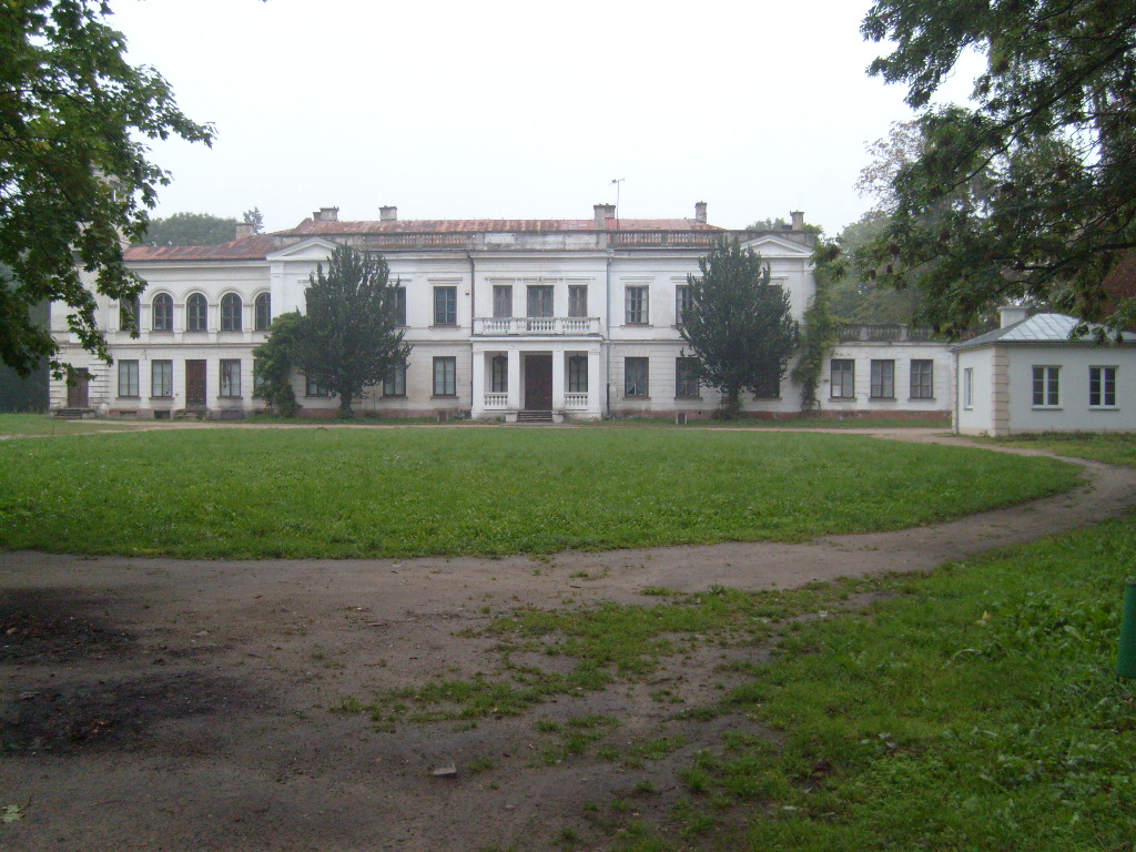 Sanniki - zespół pałacowo-parkowy im. Fryderyka Chopina, 2 poł. XIX: pałac i park (zabytek nr 444/62)